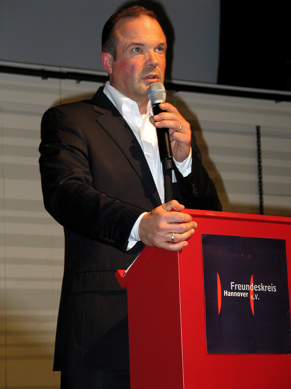 Roger Cericius, der Erste Vorsitzende vom Freundeskreis Hannover, eröffnete die Veranstaltung zur Verleihung des Stadtkulturpreises Hannover 2012 mit einem "kurzen" Grußwort ...